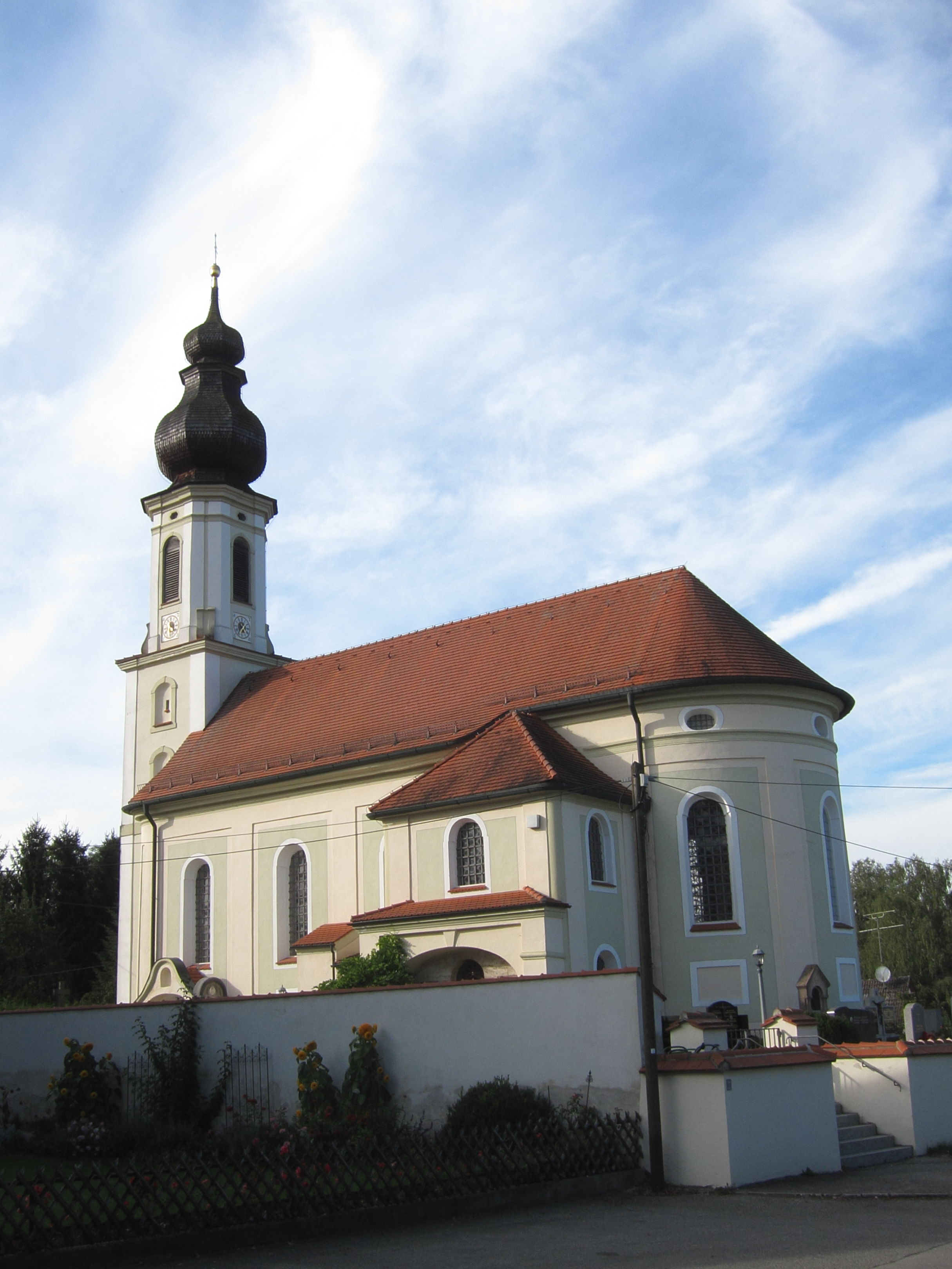 Kath. Filialkirche St. Margareth, barocker Saalbau mit Doppelzwiebelturm von Johann Baptist Lethner, 1754; mit Ausstattung.